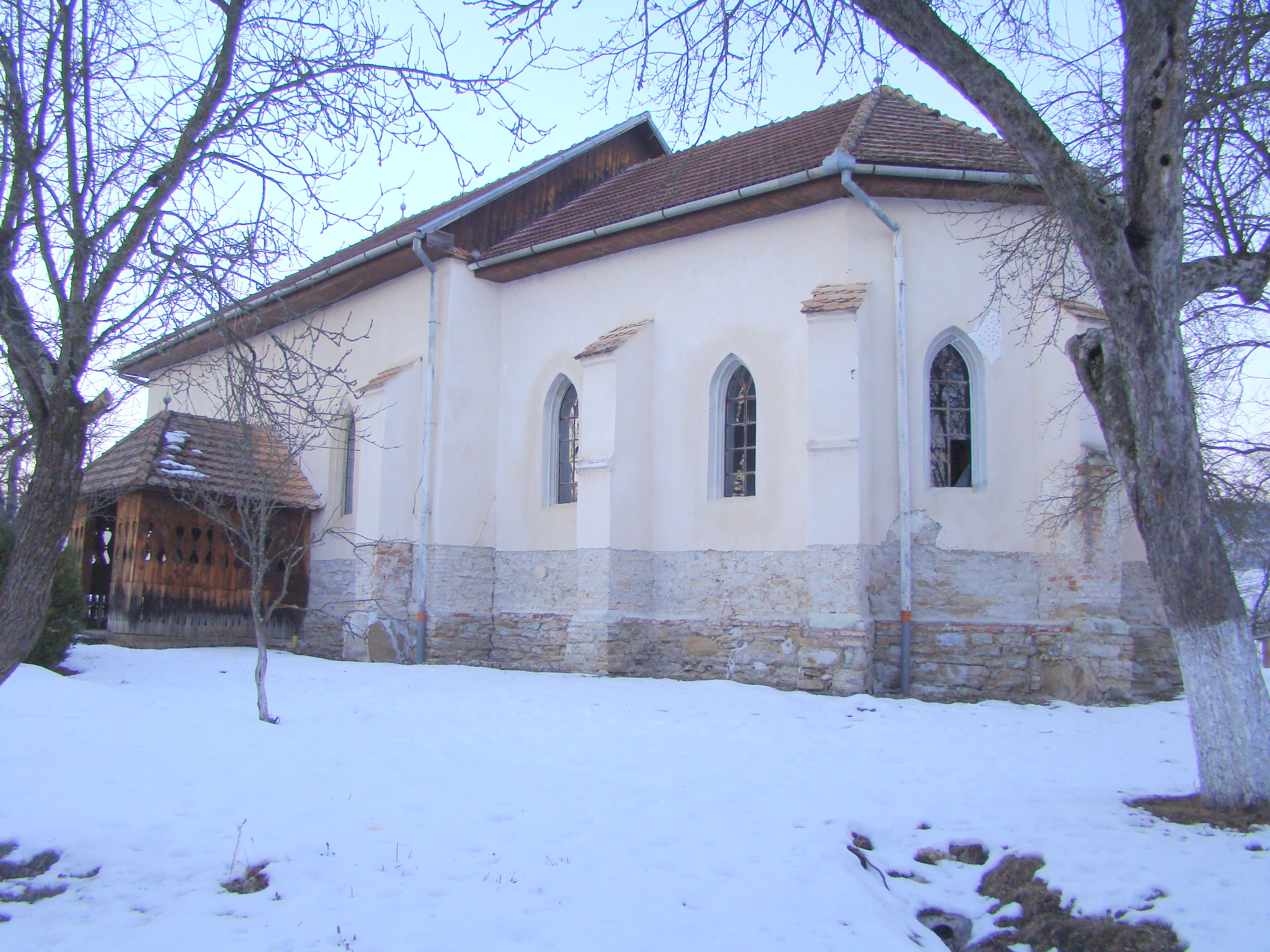 Biserica reformată, sat Filpișu Mare; comuna Breaza, judeţul Mureş 01